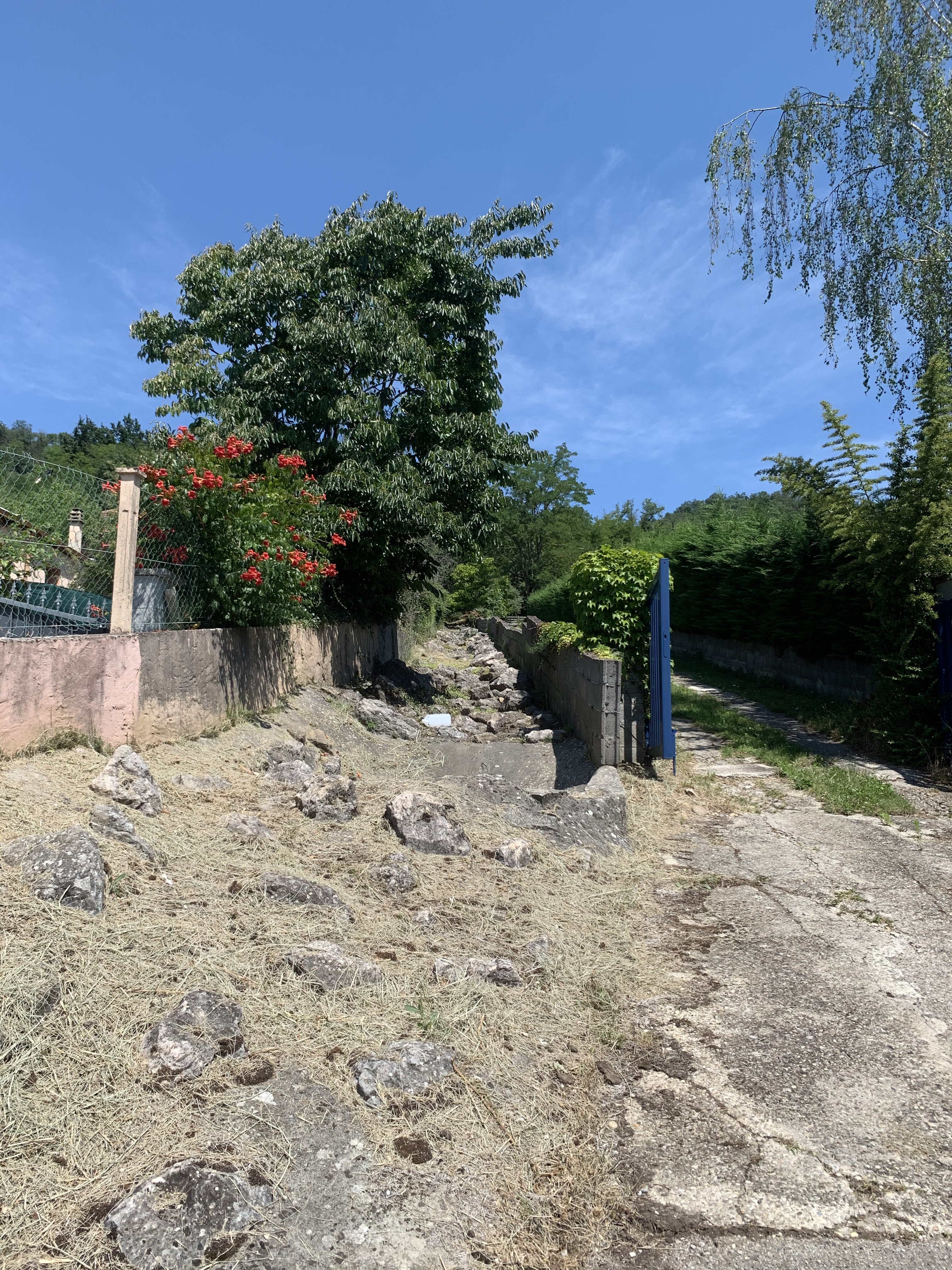 Empierrement du Cruy Bonnet (Miribel) en juin 2020.